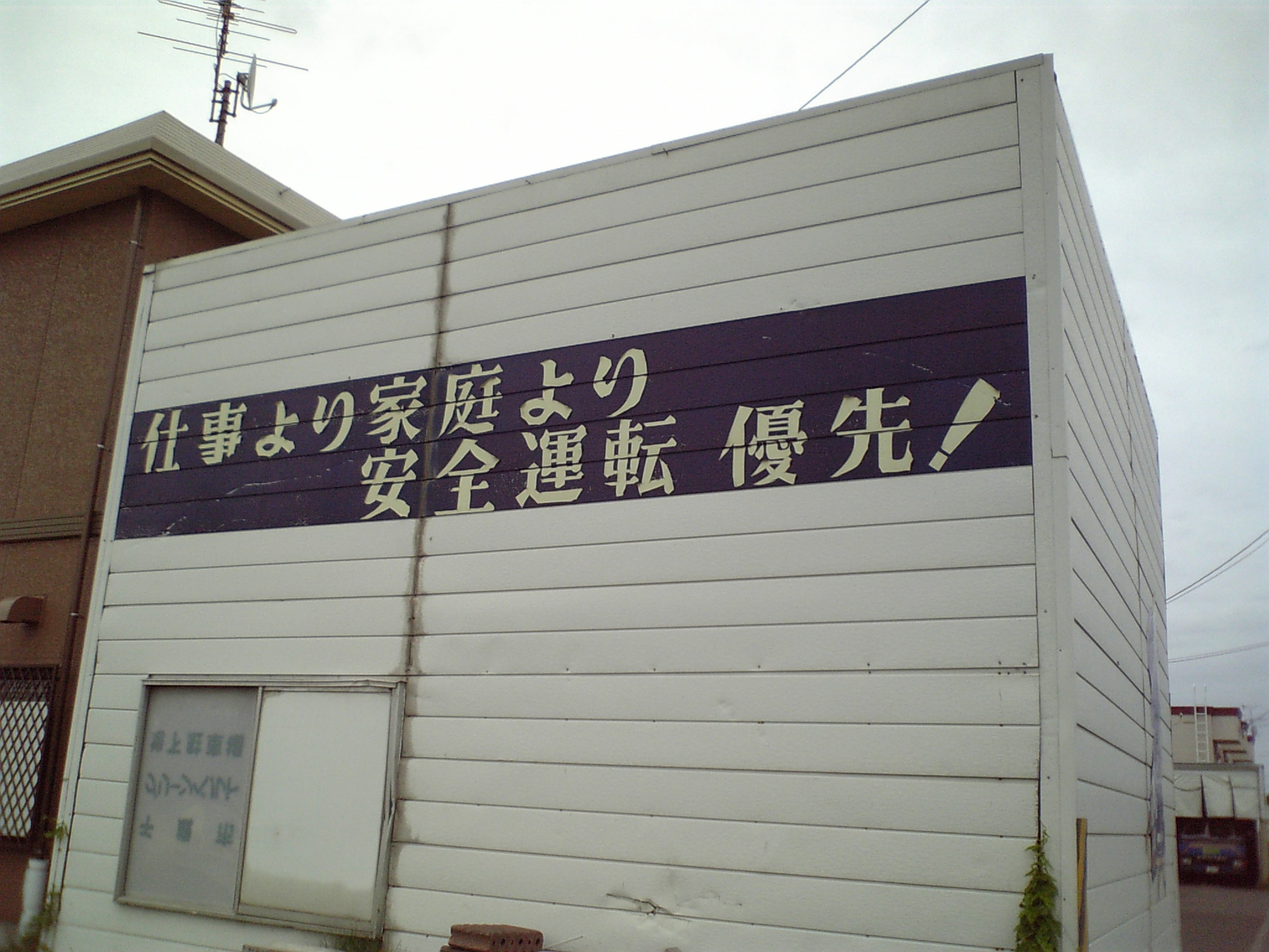 Dvc00019.Jpg 仕事より家庭より 安全運転 優先 !